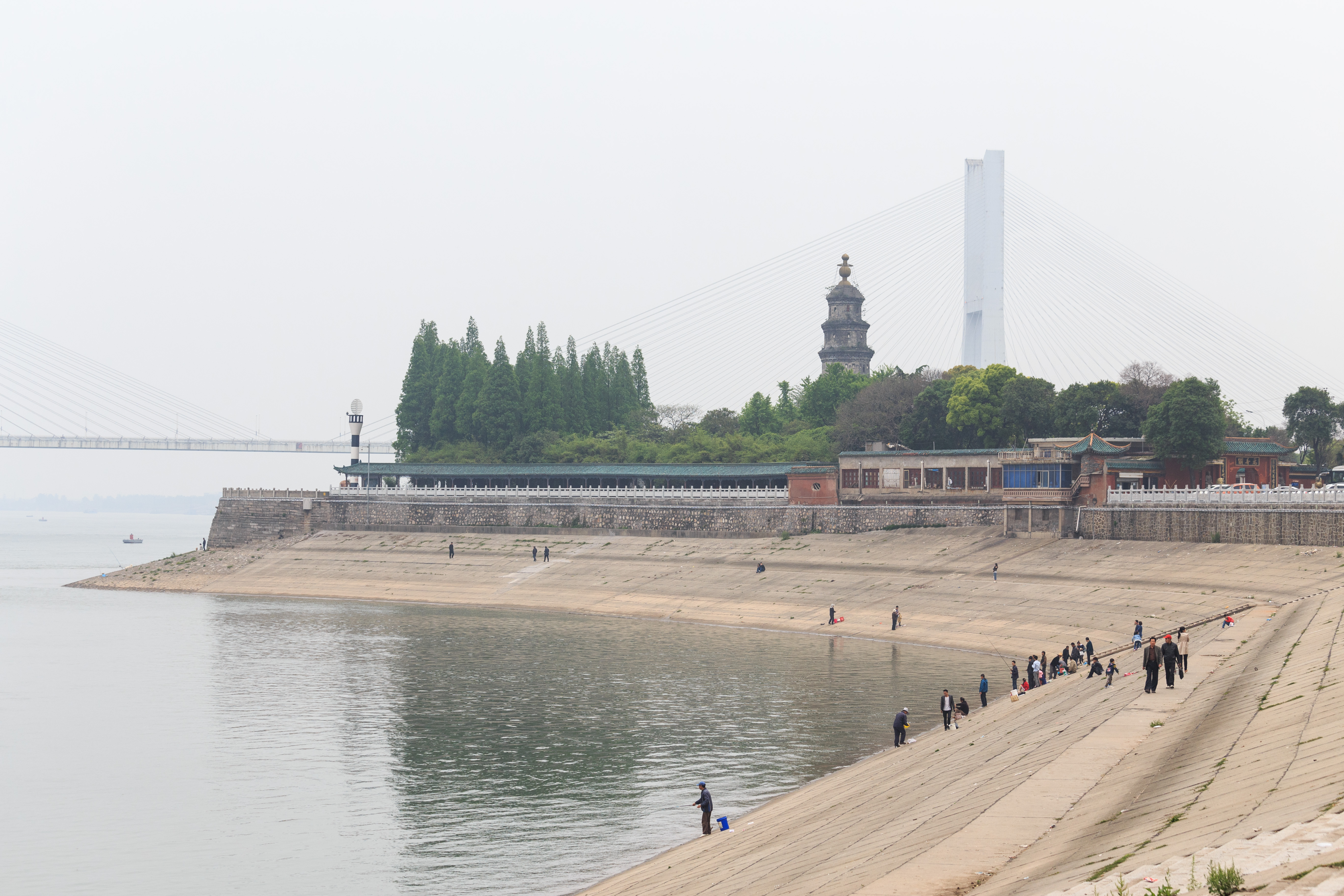 荆州万寿宝塔—— 观音矶全景，远处为荆州长江大桥